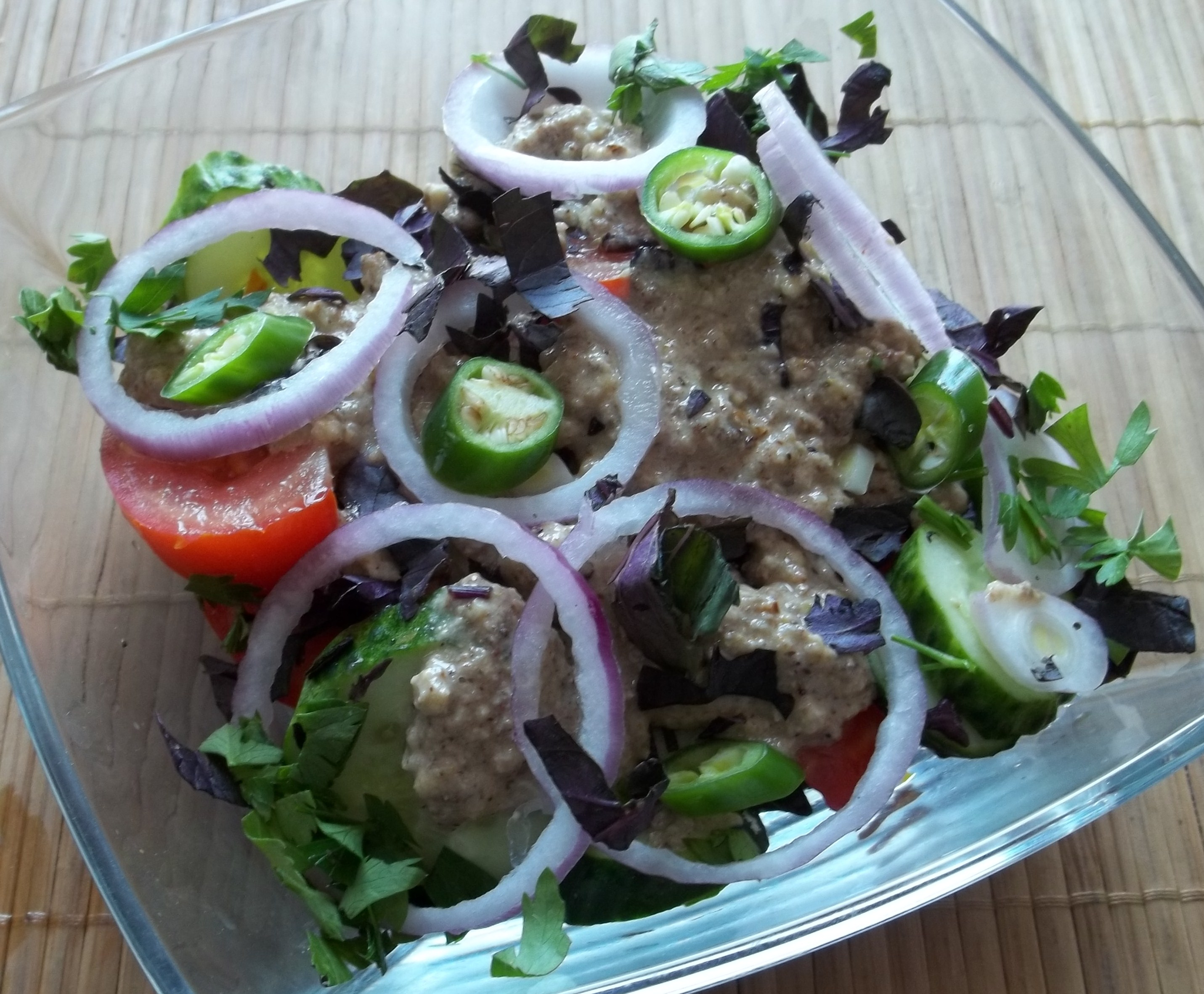 Грузинский салат с грецкими орехами